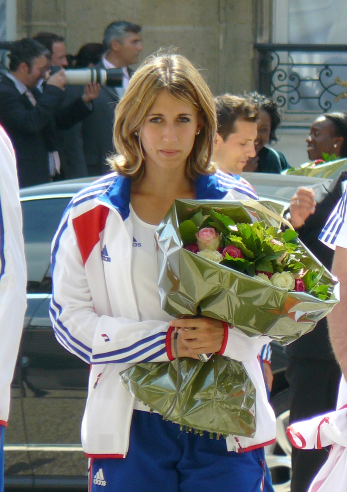 Céline Distel, athlète française (sprint), lors de la réception à l'Élysée des médaillés de Barcelone , le 3 août 2010.